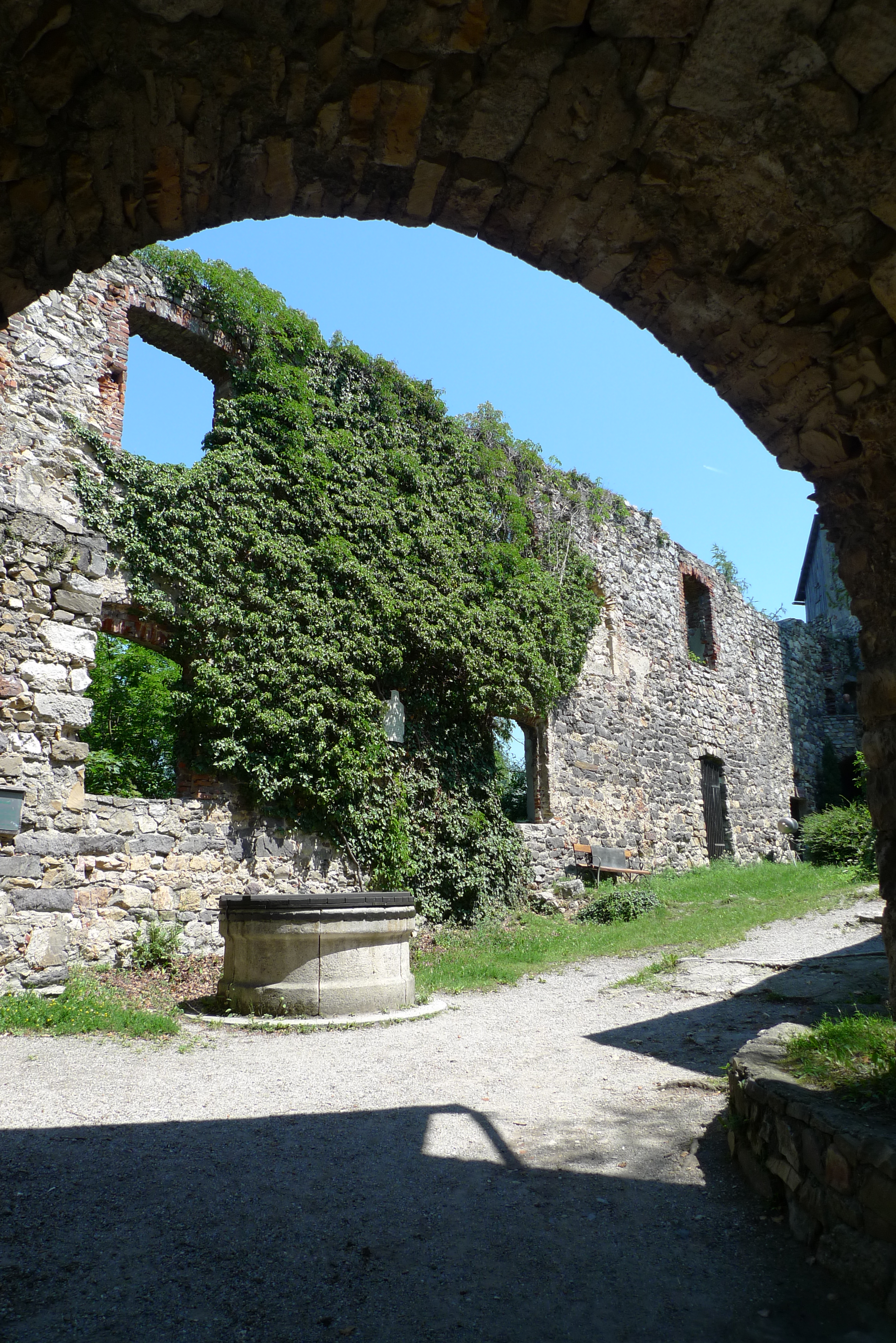 Tordurchblick Burgruine Gösting; eigene Aufnahme des Autors